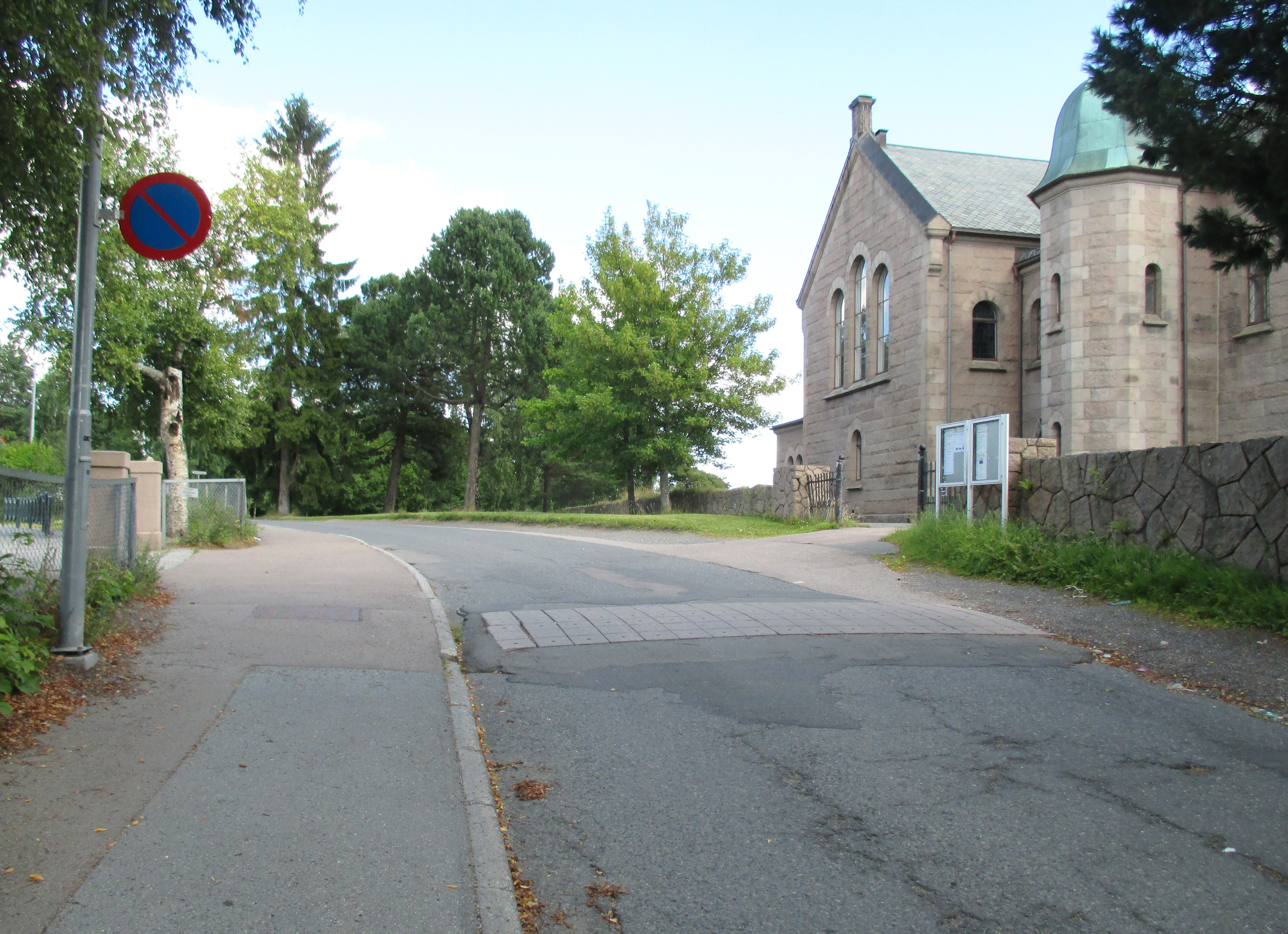 Pastor Blaauws vei på Grorud i Oslo